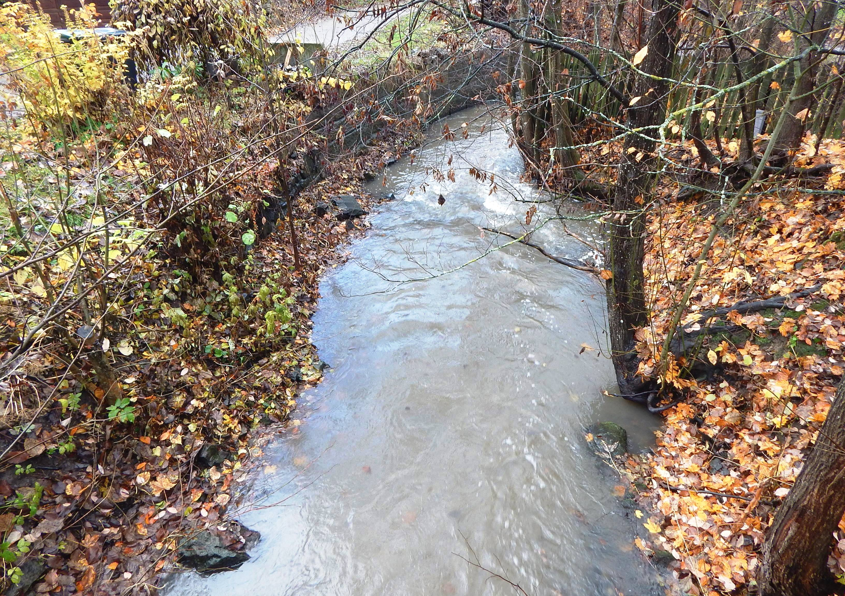 Sognsvannsbekken ved Anne Maries vei